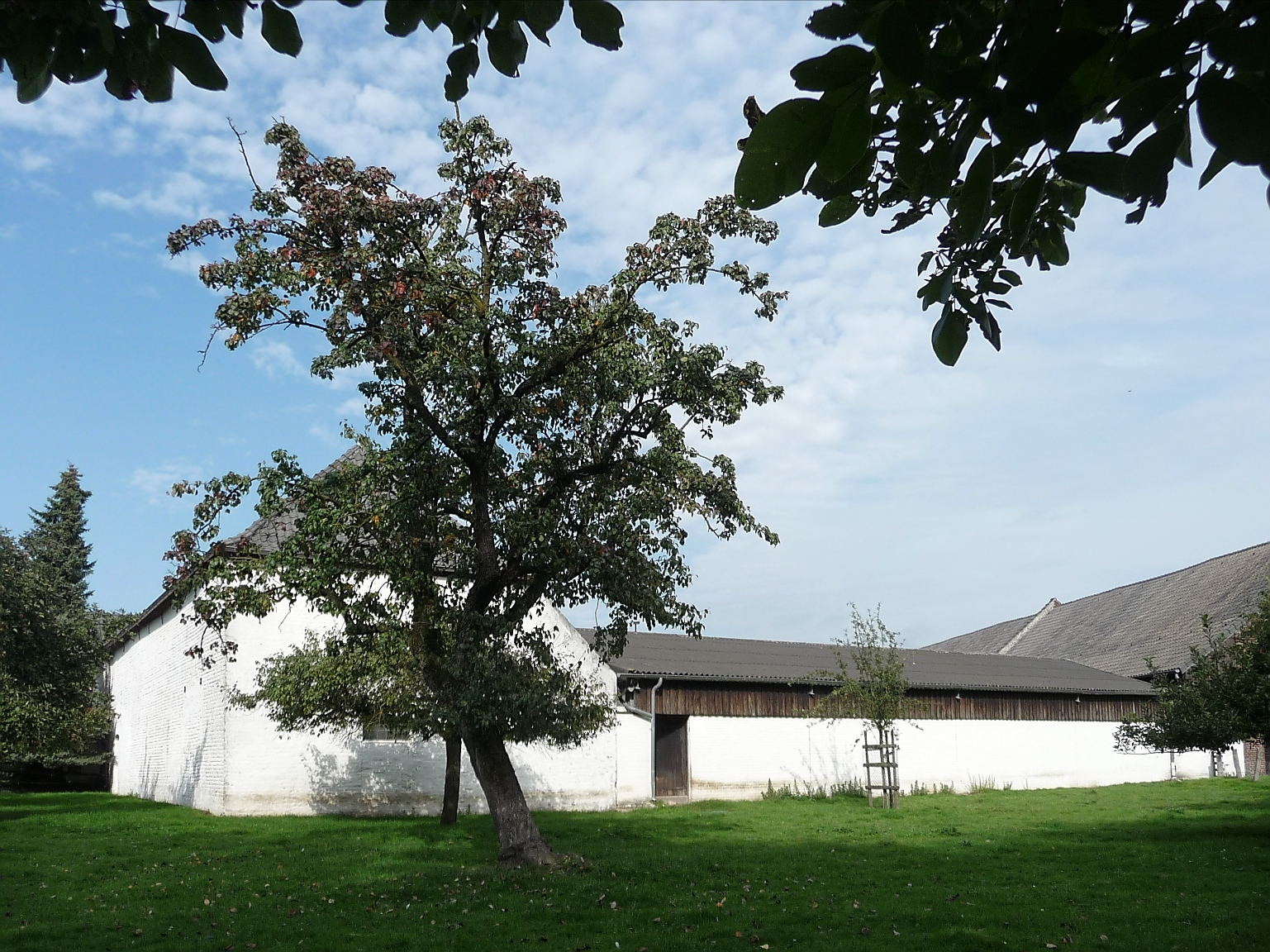 Denkmalliste Nr. 35 Wirtschaftsgebäude Haus Neersdonk in Vorst, Haus Neersdonk 1